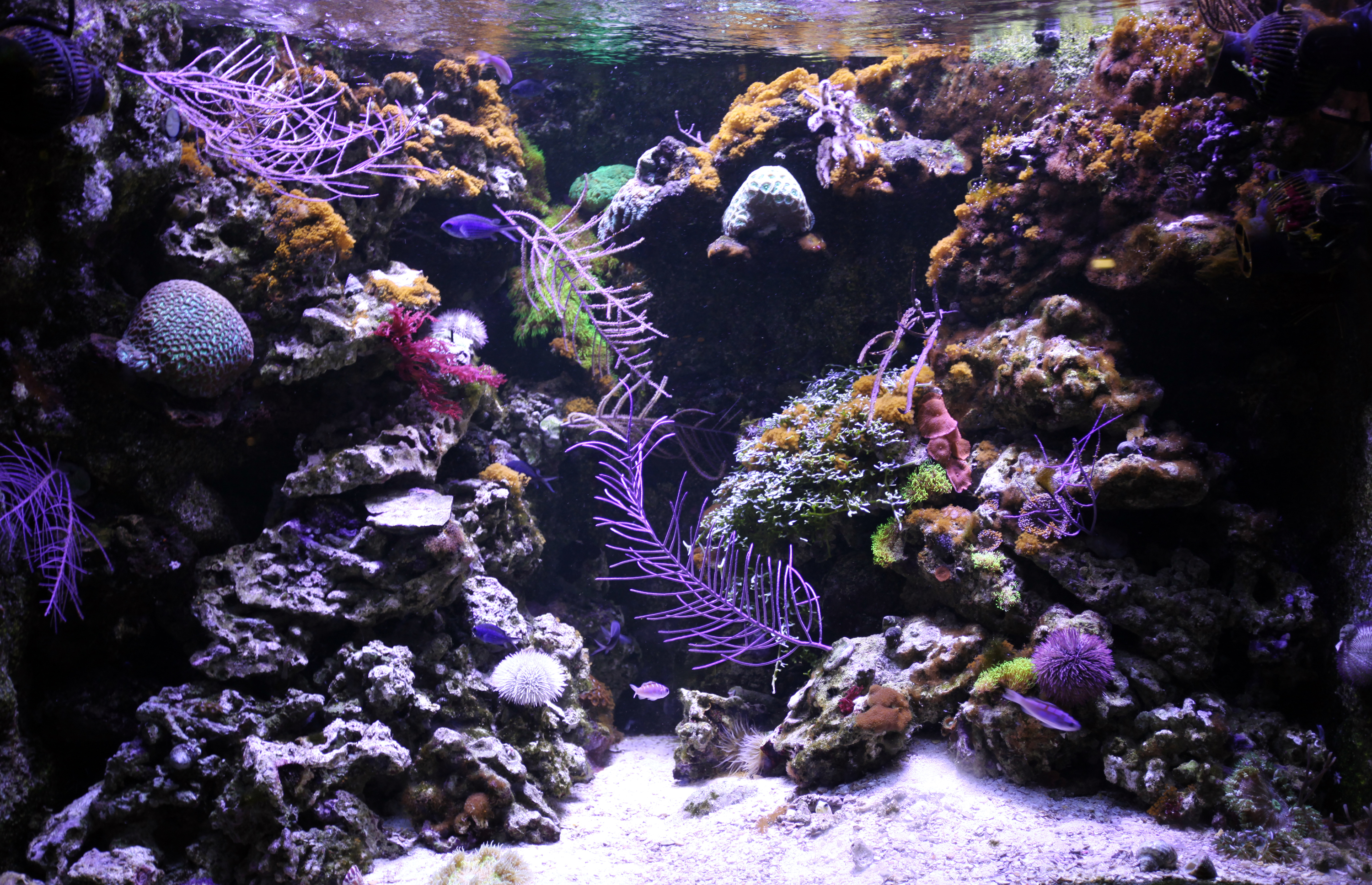 Aquarium Coral reef